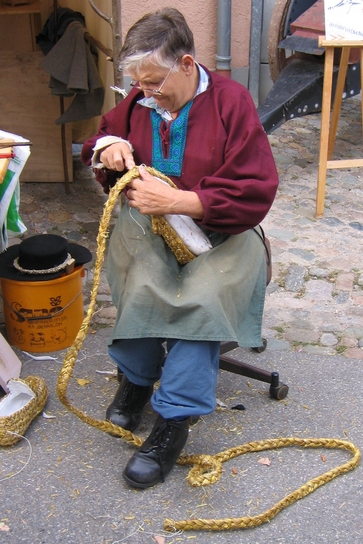 Frau macht Strohschuhe während der Veranstaltung Stages in Staufen.